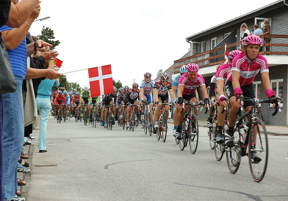 Post Danmark Rundt 2006, 1. etape - hovedfeltet kører gennem Gedsted